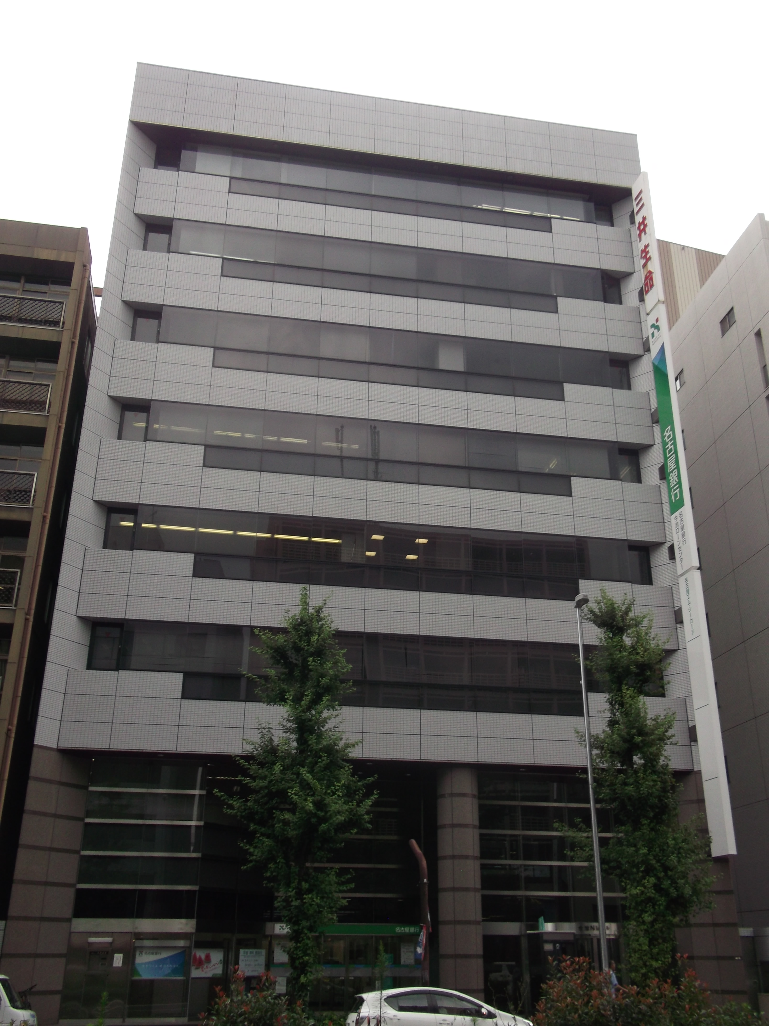 名古屋市千種区の今池MNビルを南側公道より撮影